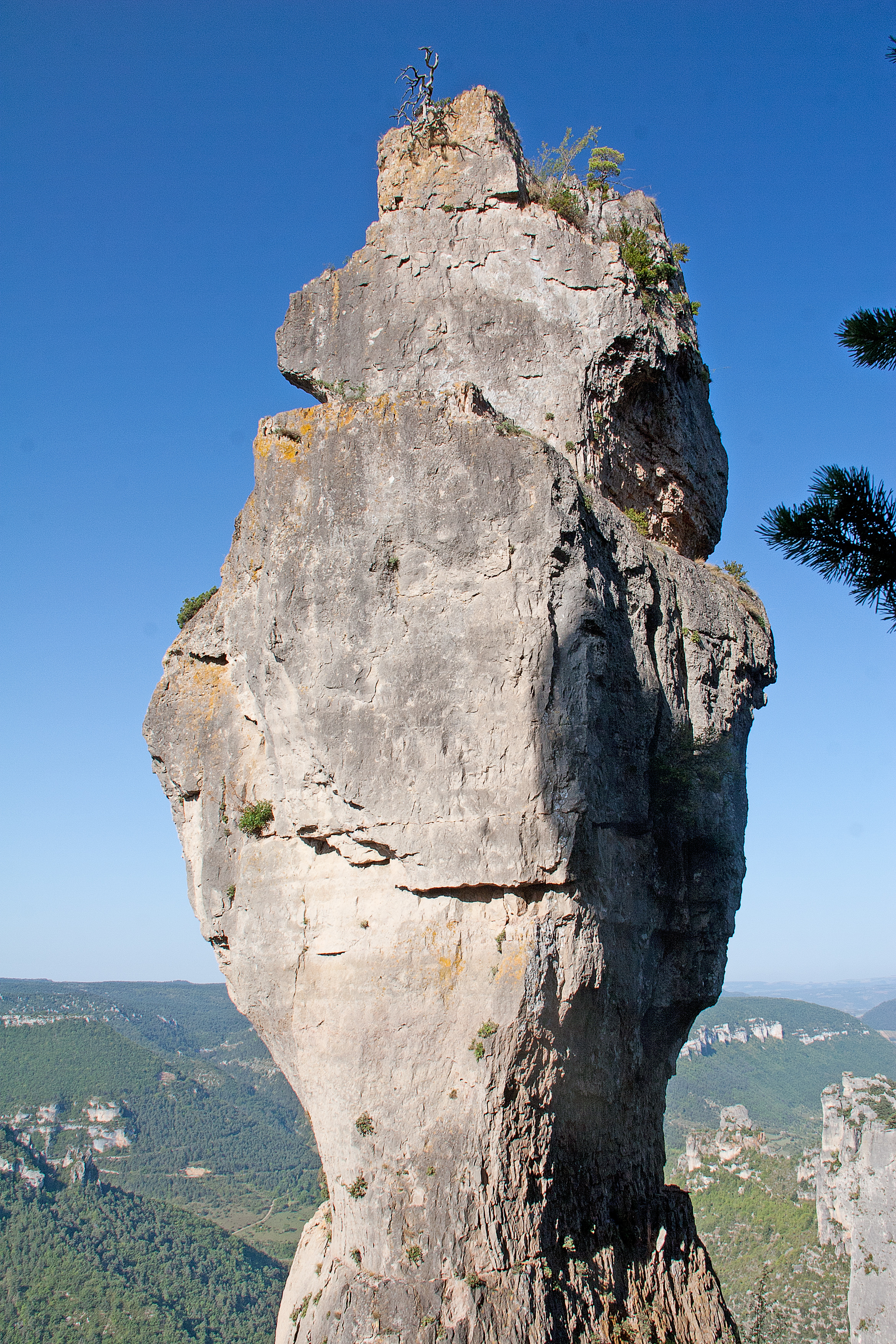 La Vase Chinese